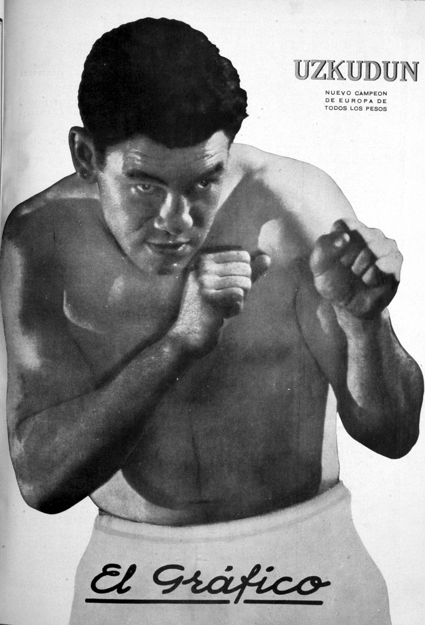 El Grafico del 26 de Junio de 1926. Edicion 364